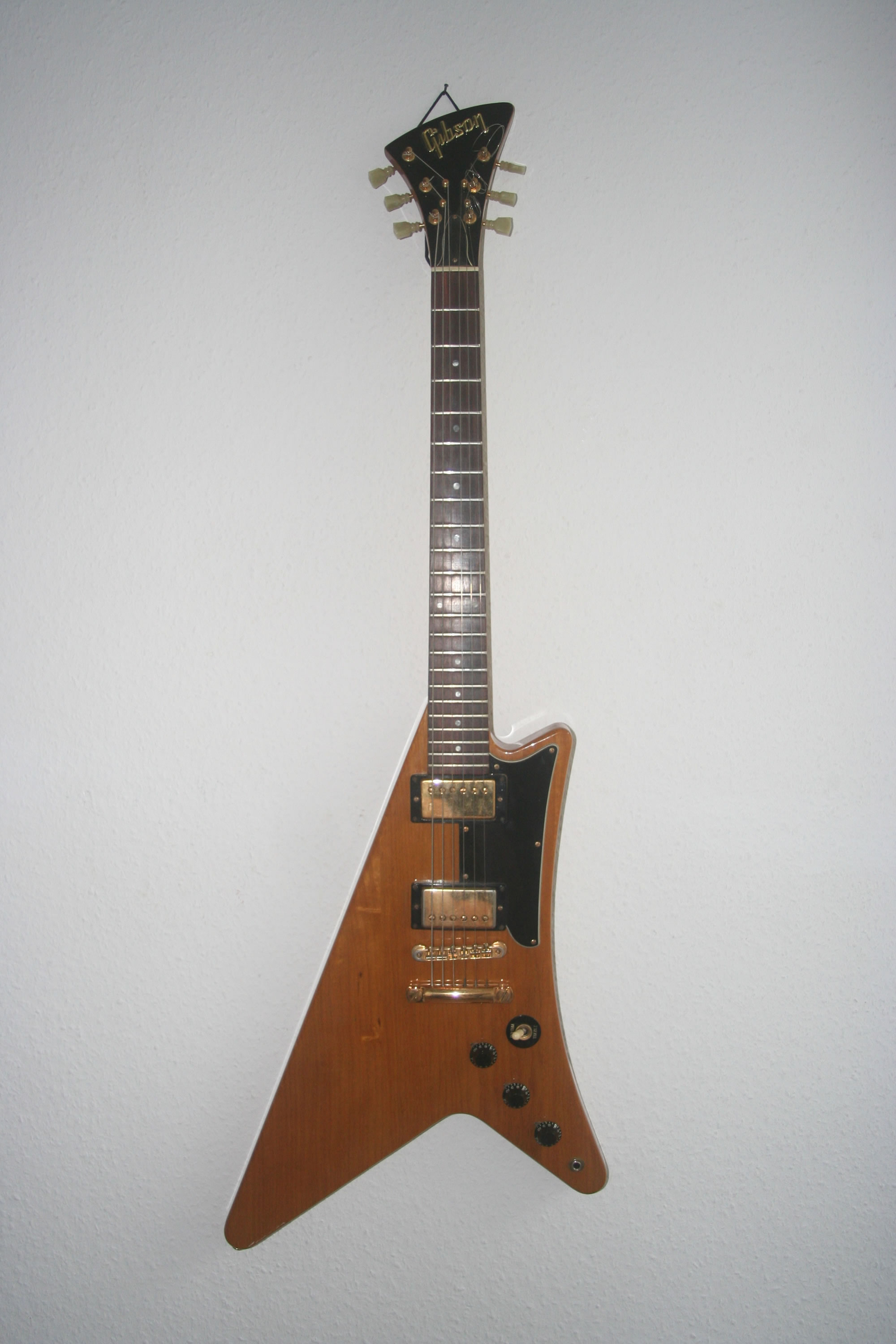 Gibson Moderne Heritage 1982